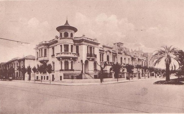 Vista de una esquina del Boulevard Oroño a principios del siglo XX. Se ven lujosas residencias familiares.